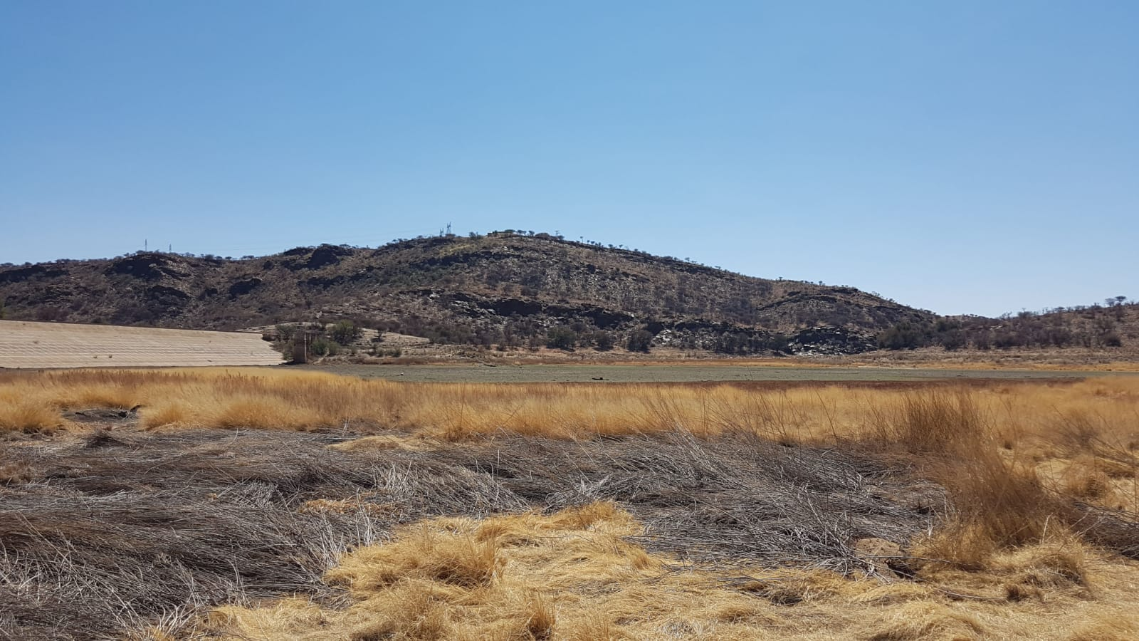 Blick auf den Damm des ausgetrockneten Avis-Stausee